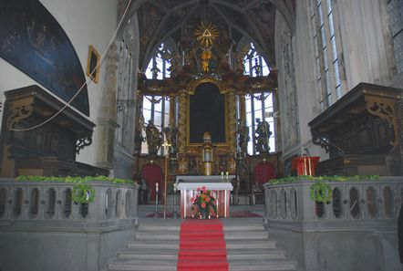 Presbyterium chrámu sv. petra a Pavla v Mělníku.